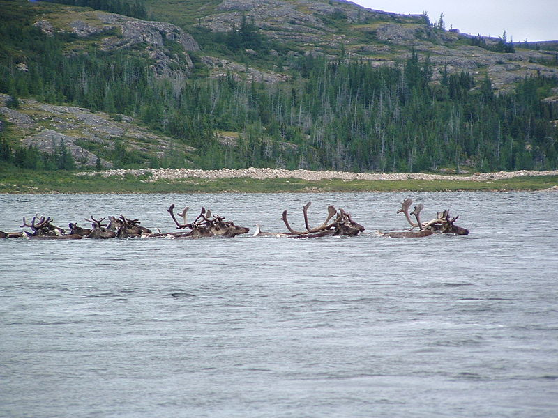 caribous traversant la rivière aux Feuilles.